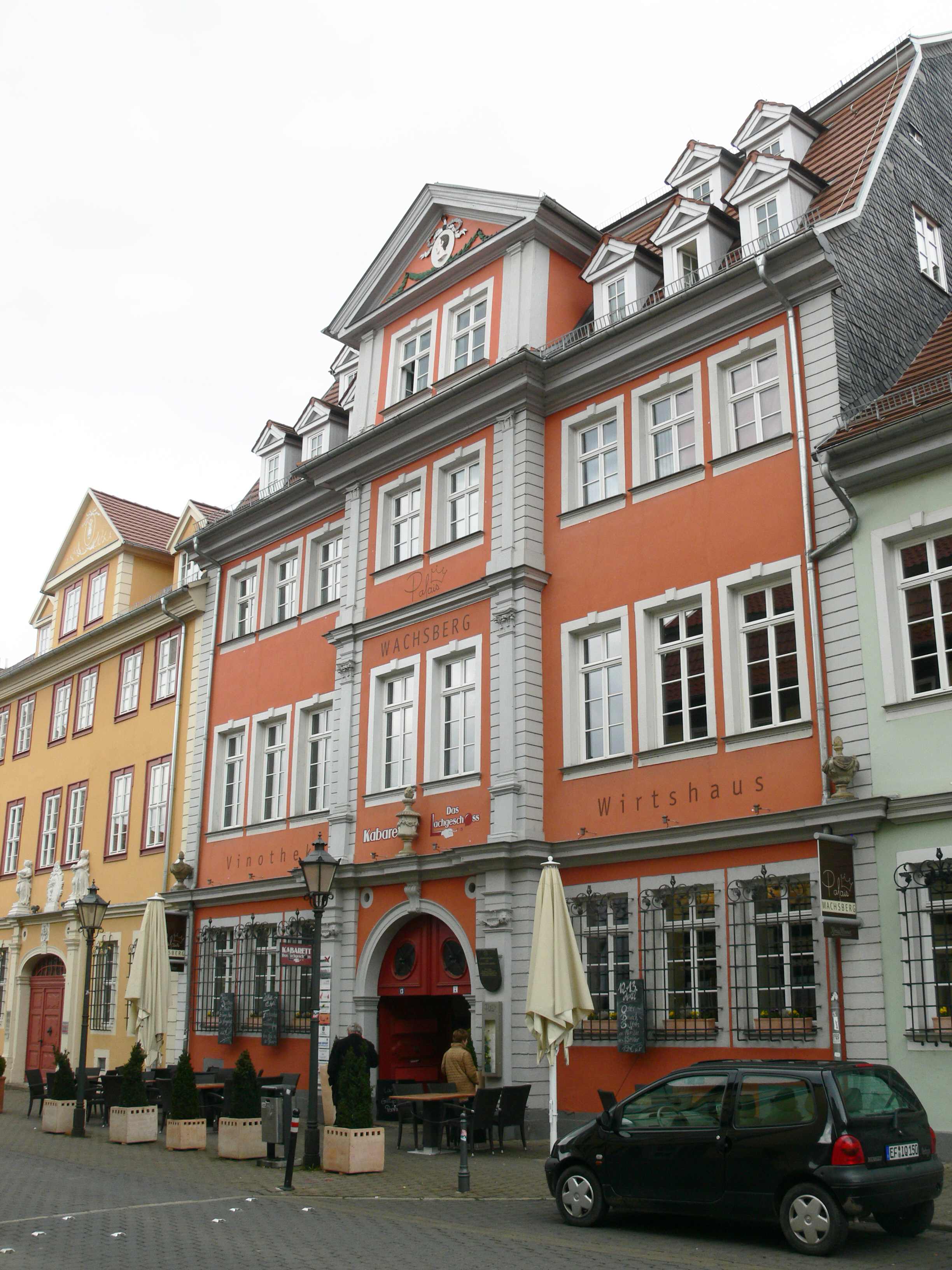 Erfurt, Futterstraße, Gasthaus "Palais Wachsberg" mit Kabarett "Das Lachgeschoss"